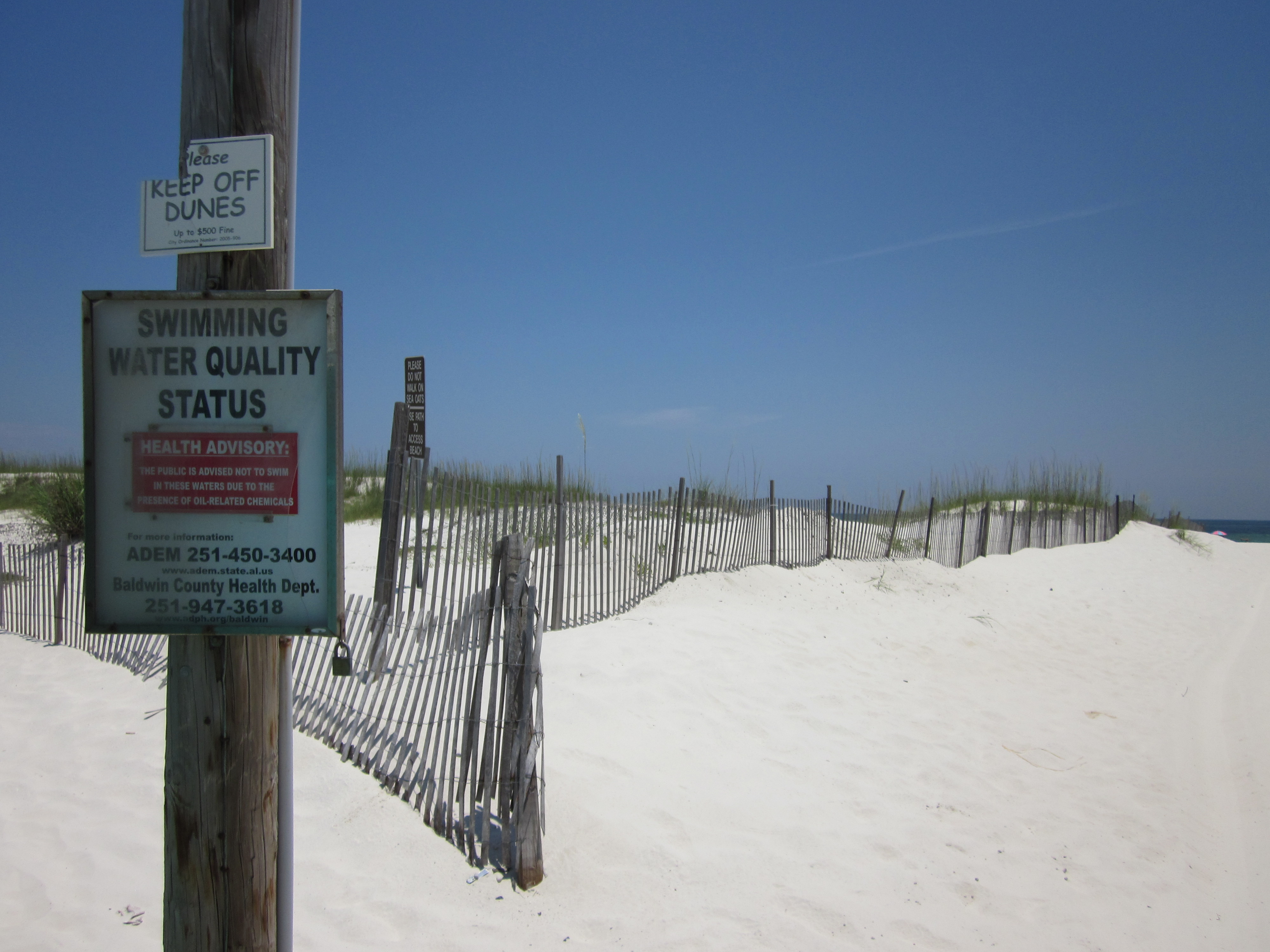 Orange Beach, Alabama